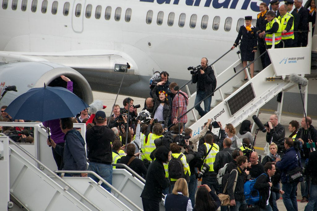 Lena Meyer-Landrut in Hannover